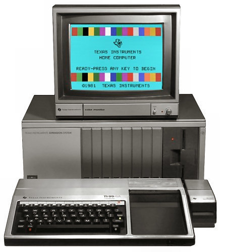 Foto eines Texas Instruments TI Peripheral Expansion System mit TI Monitor und Konsole